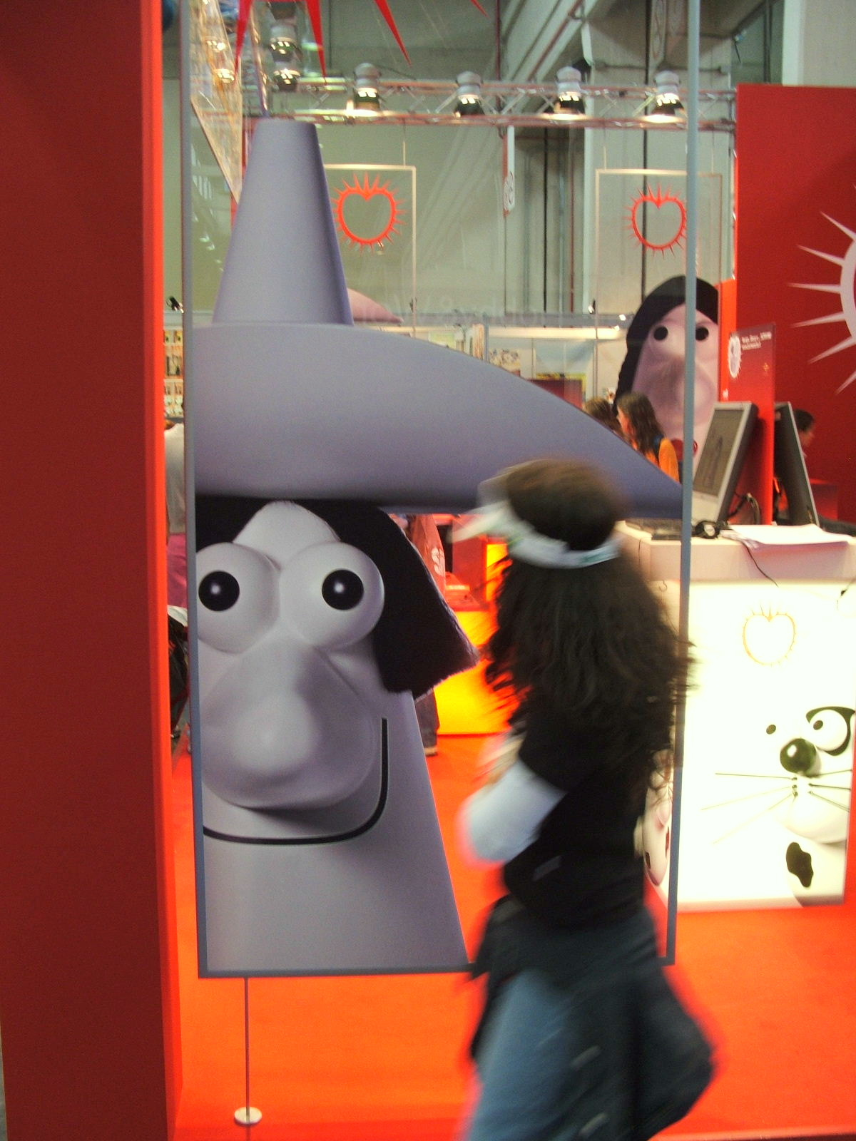 Fiera internazionale del libro 2006, stand Lavazza Torino